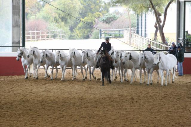 Cobra de jument, PRE